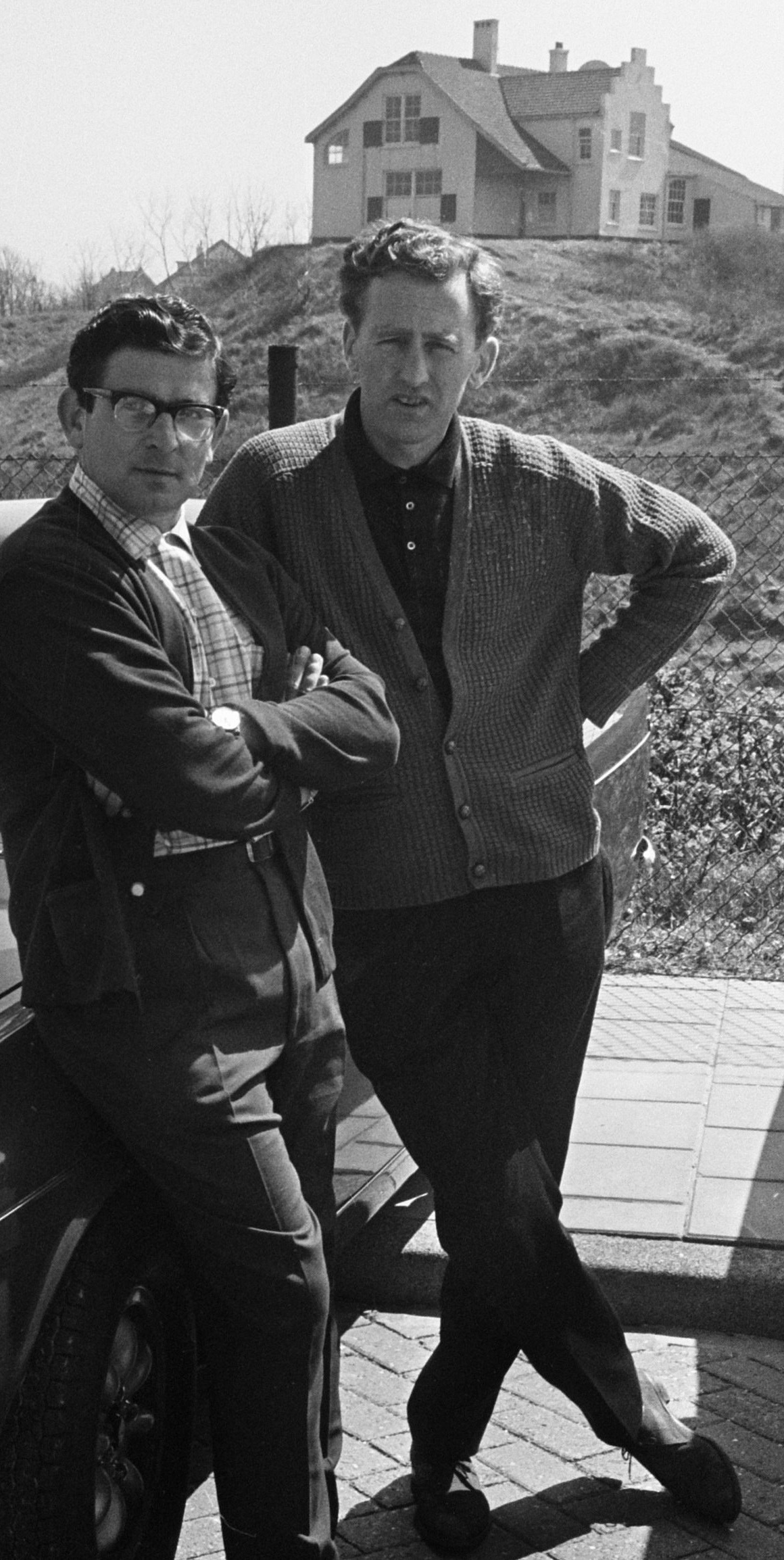 Voorbereidingen Tulpenrallye, Peter Harper (rechts) en Robin Turvey (in een Sunbeam Tiger)